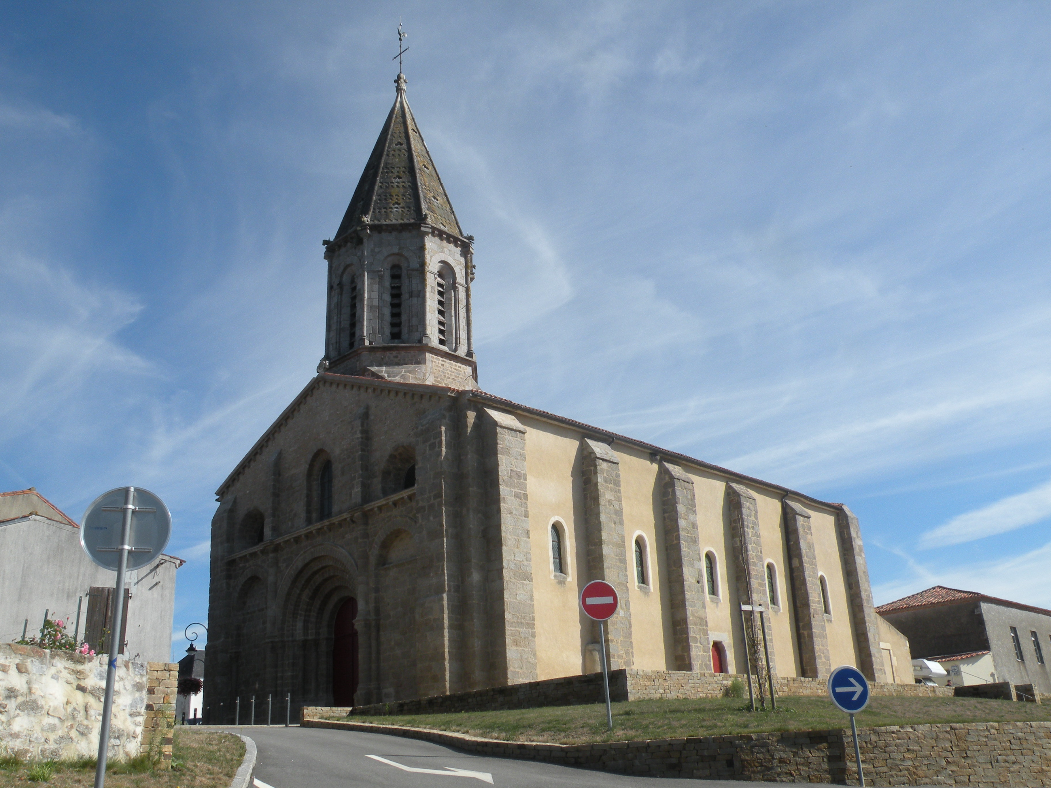 Église Saint-Jacques de Moutiers-les-Mauxfaits .